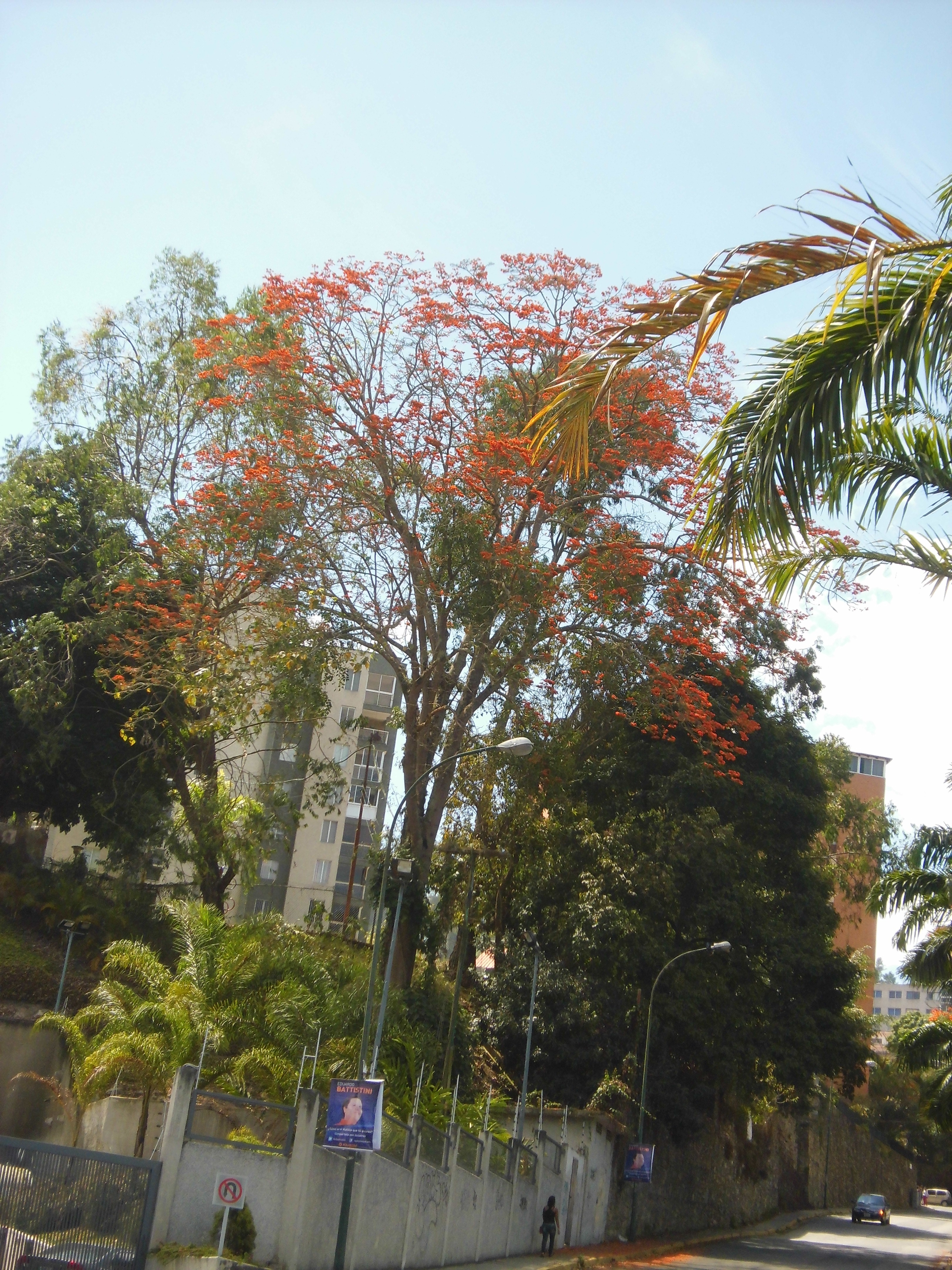 Erythrina poeppigiana (Walp.) O.F.Cook localizado a la entrada de Los Pinos 2 en el municipio El Hatillo, estado Miranda - Venezuela